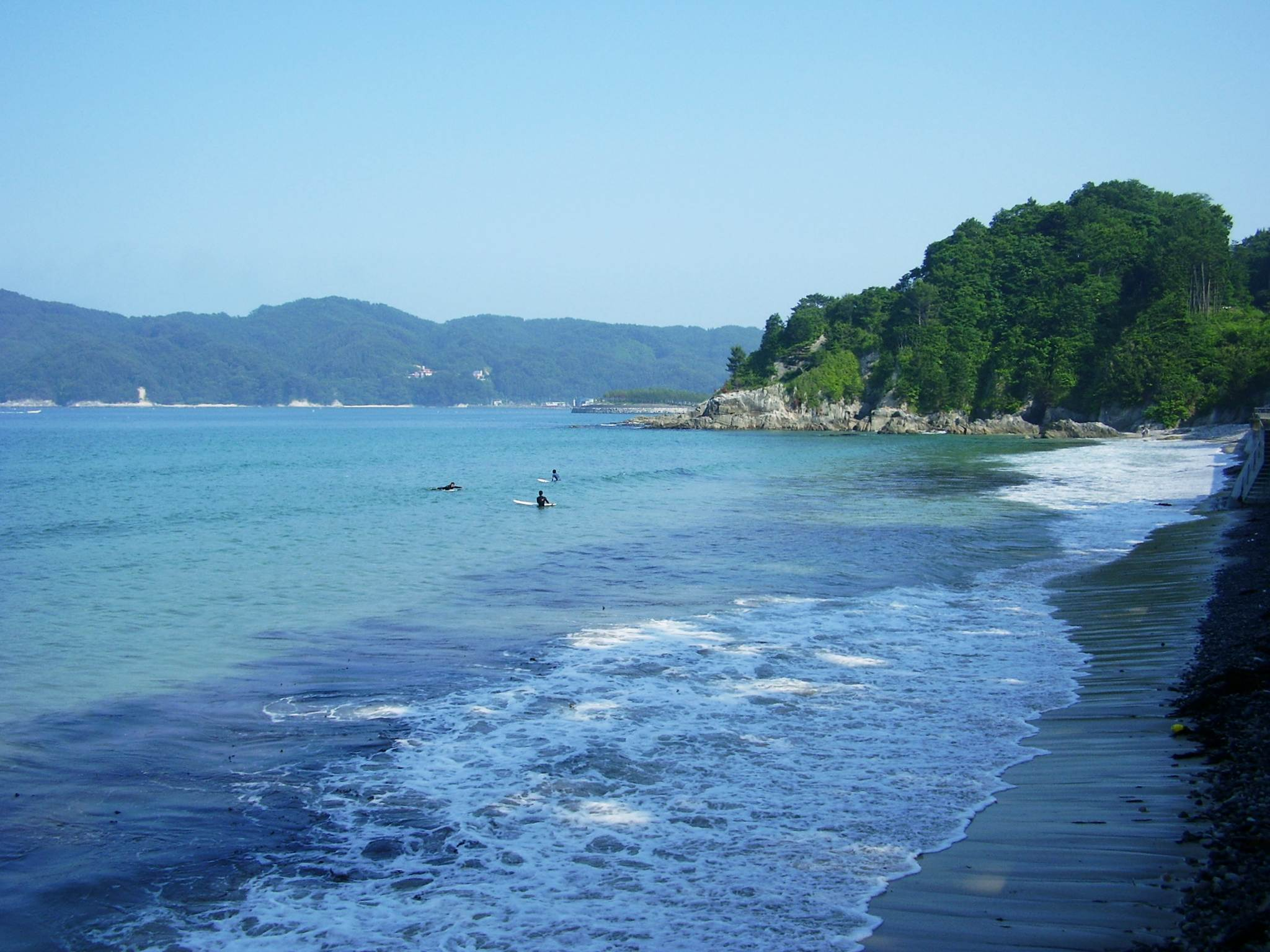 浪板海岸Namiita-kaigan